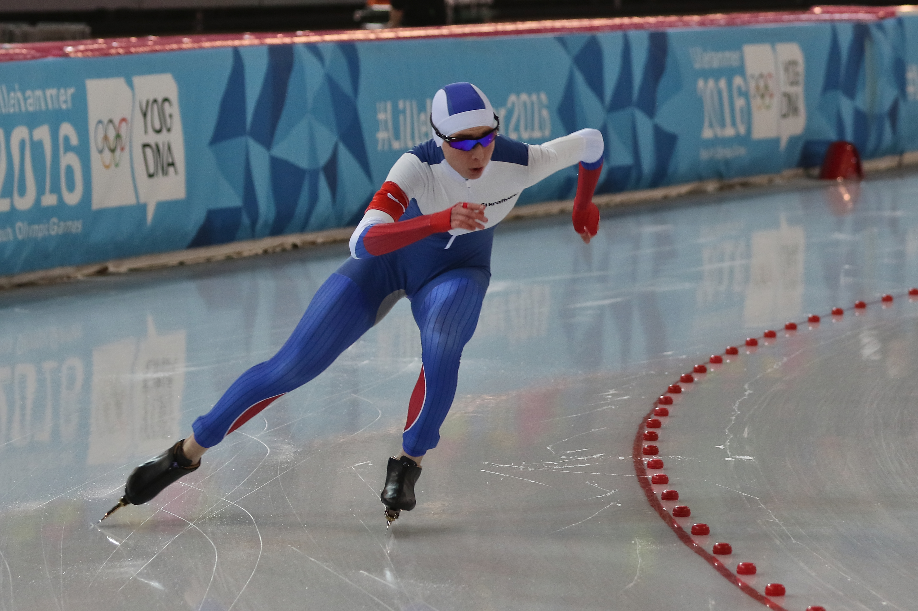 Lillehammer 2016 - Speed skating Ladies' 500m race 1 - Elena Samkova